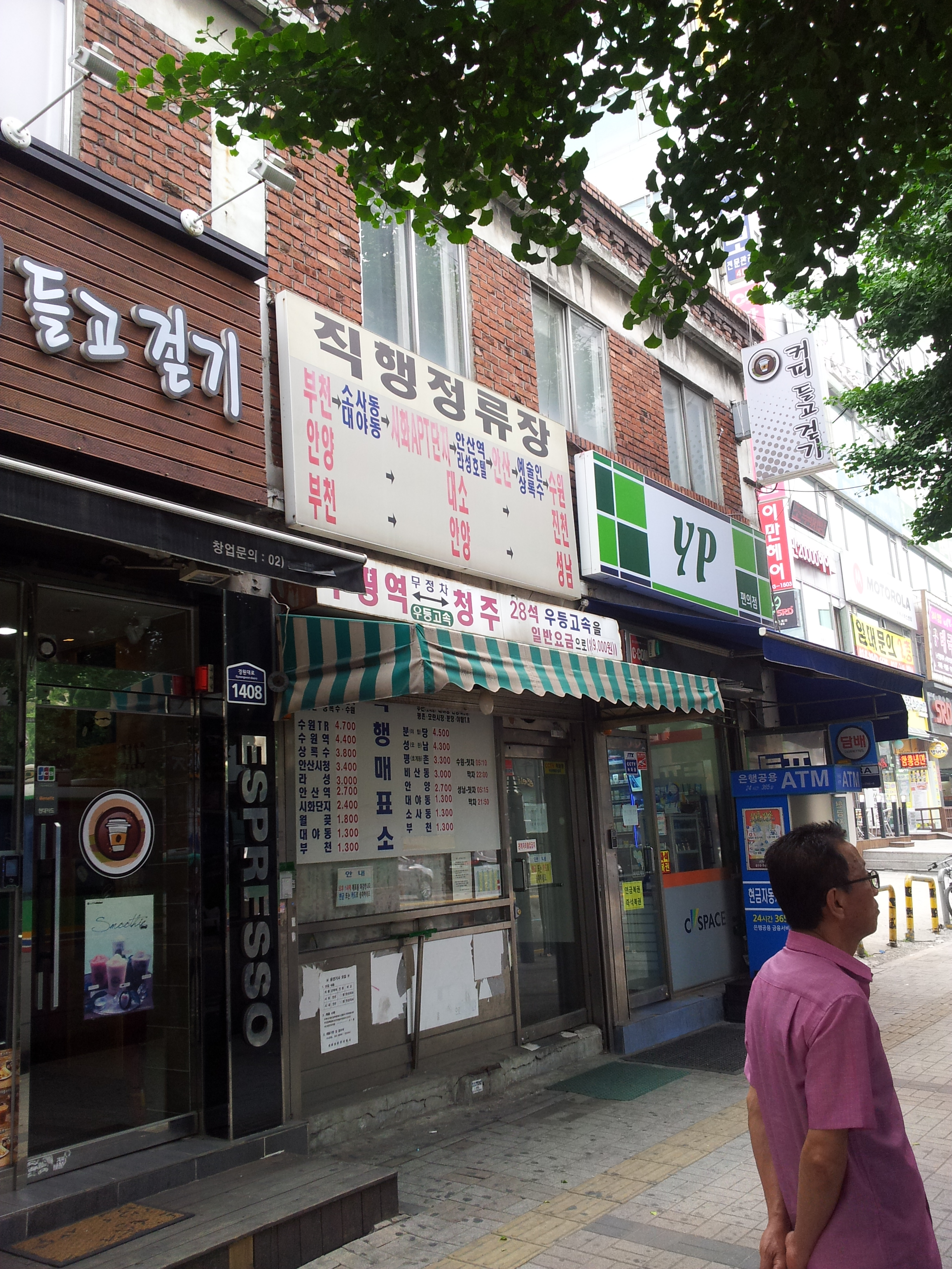 부평역시외버스정류장 모습